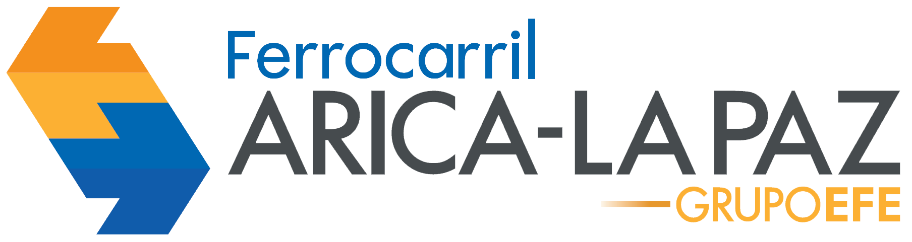 Emblema de la administración chilena del Ferrocarril de Arica a La Paz.